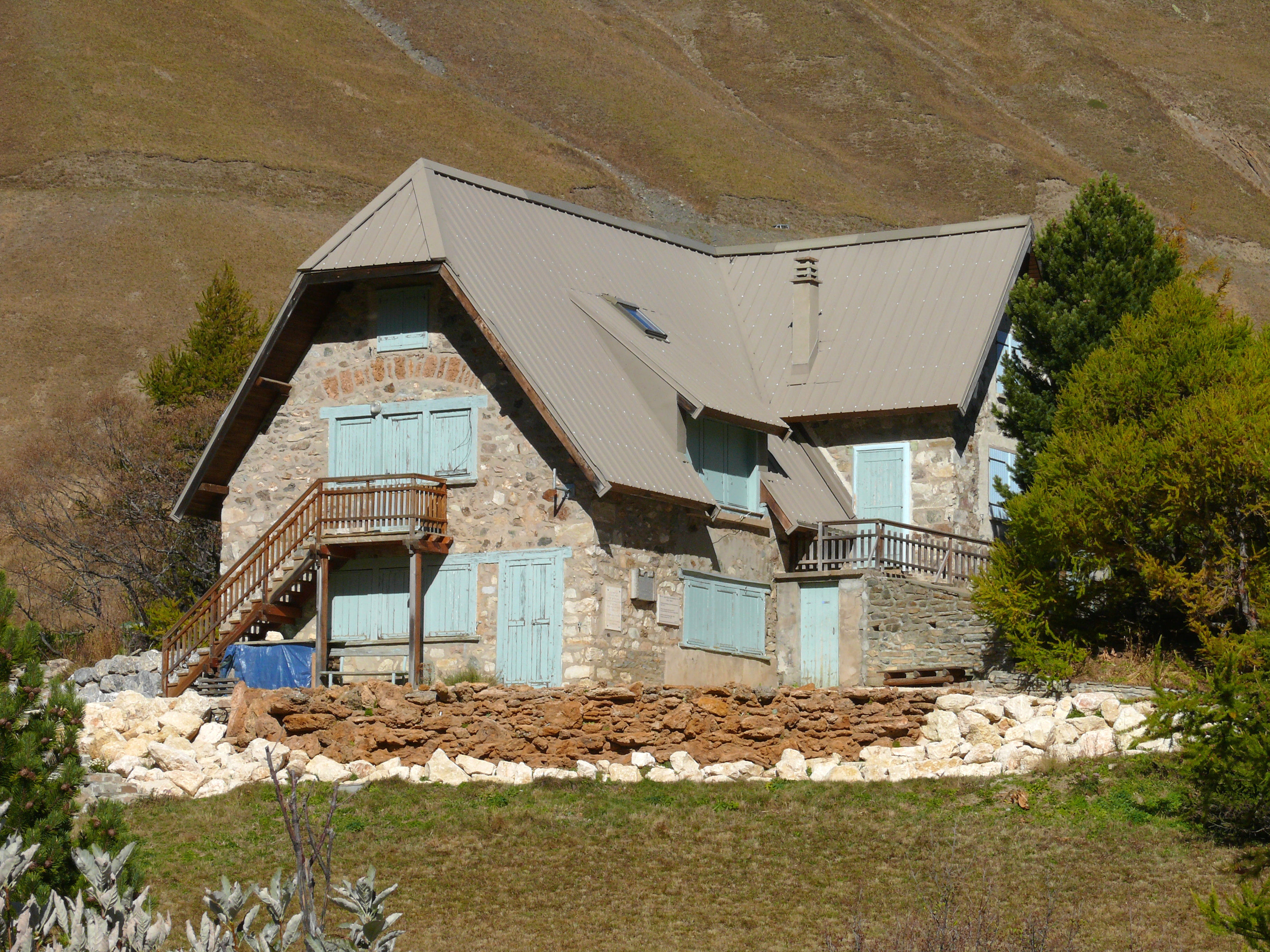 Station alpine Joseph-Fourier - Chalet Mirande du jardin botanique alpin